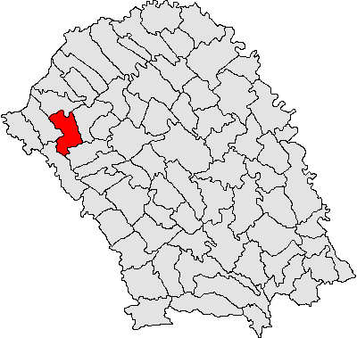 Categorie:Hărţi ale judeţului Botoşani